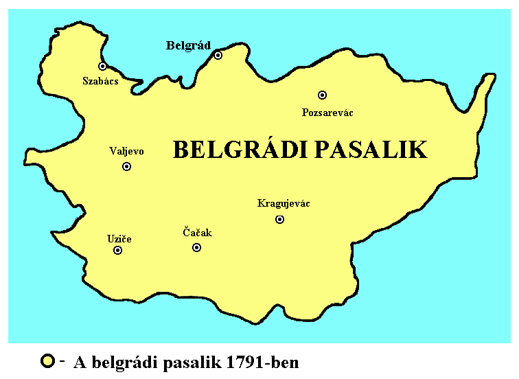 A belgrádi pasalik 1791-ben